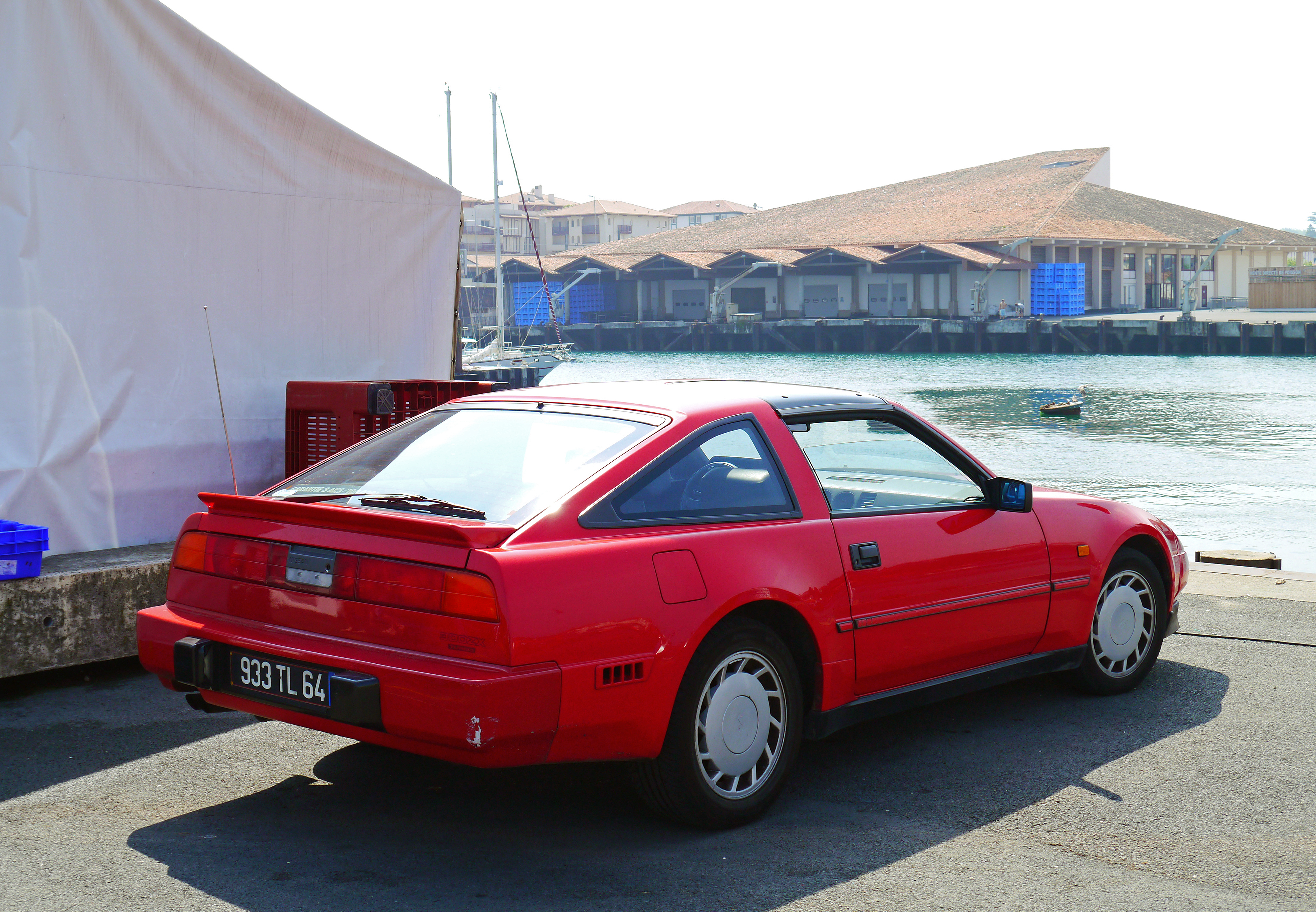 1989 Nissan 300ZX Turbo "Z31" - 3.0L V6 Turbo engine (170 kW; 230 bhp).